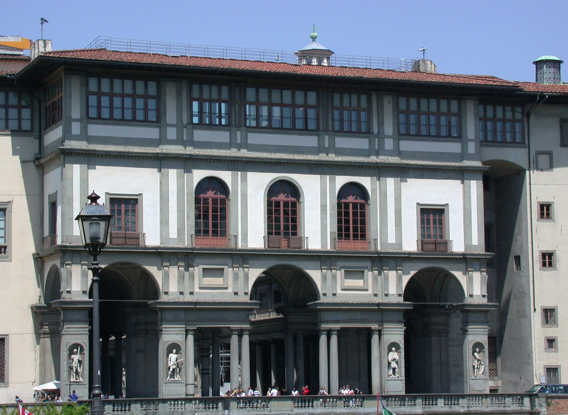 Gli Uffizi a Firenze.